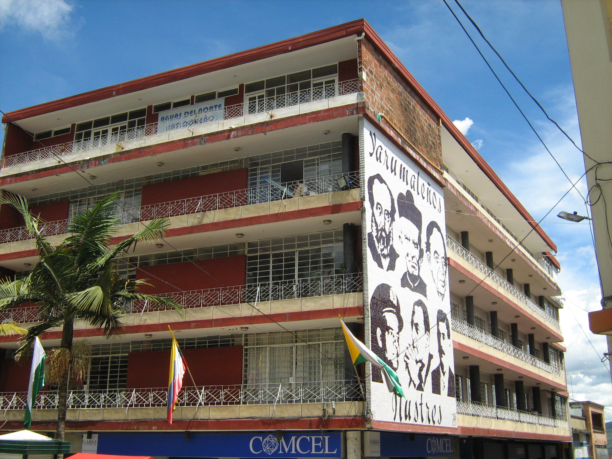 Alcaldía del Municipio de Yarumal, Antioquia, Colombia.